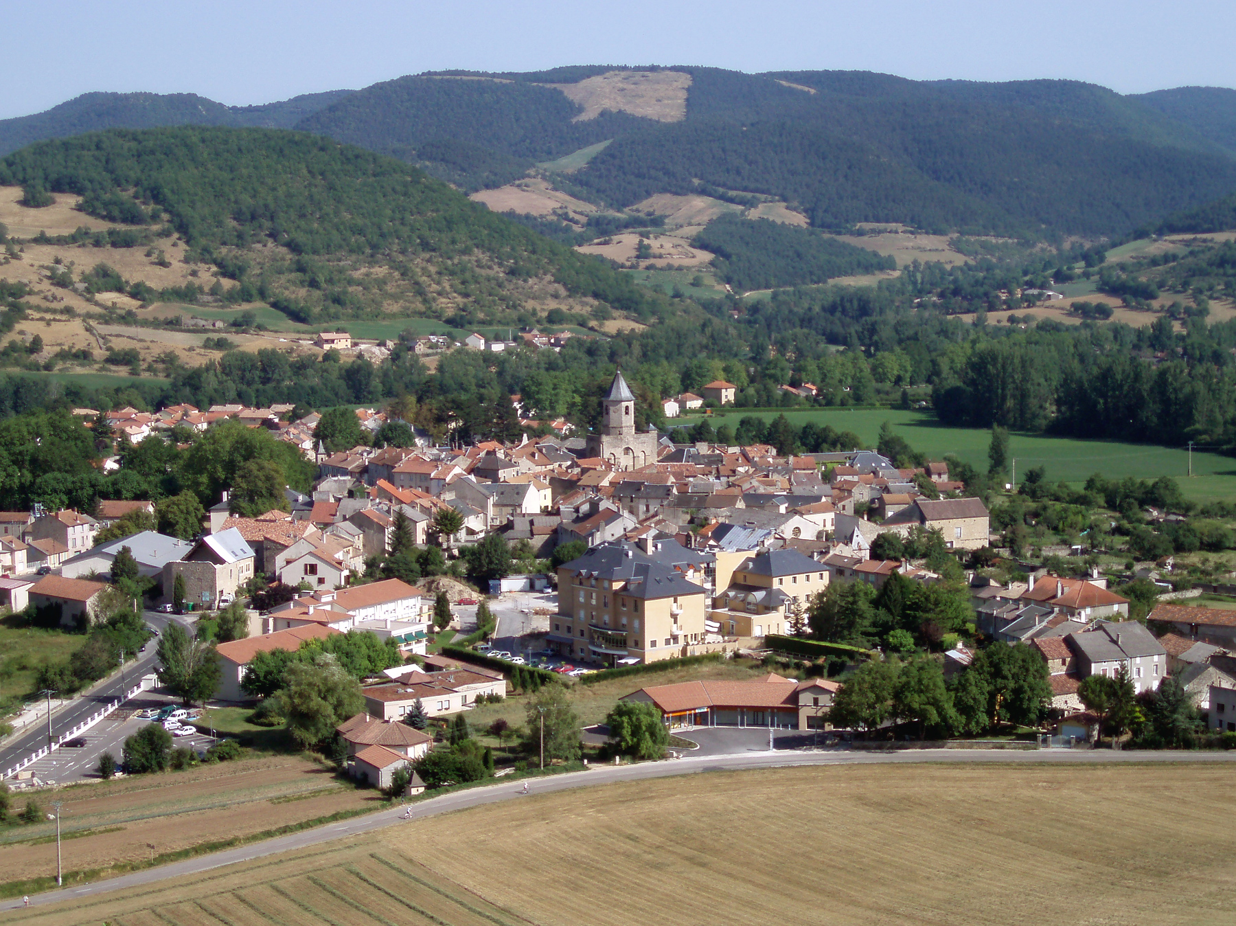 Vue générale de Nant (Aveyron)